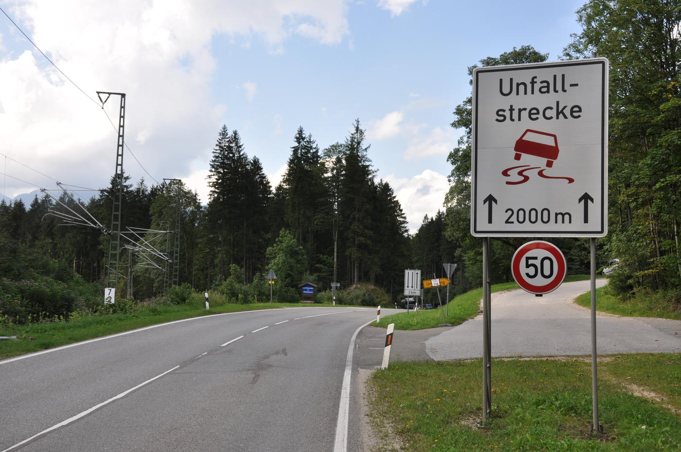 Unfallstrecke Hallthurmer Berg (B 20) zwischen Bayerisch Gmain und Bischofswiesen